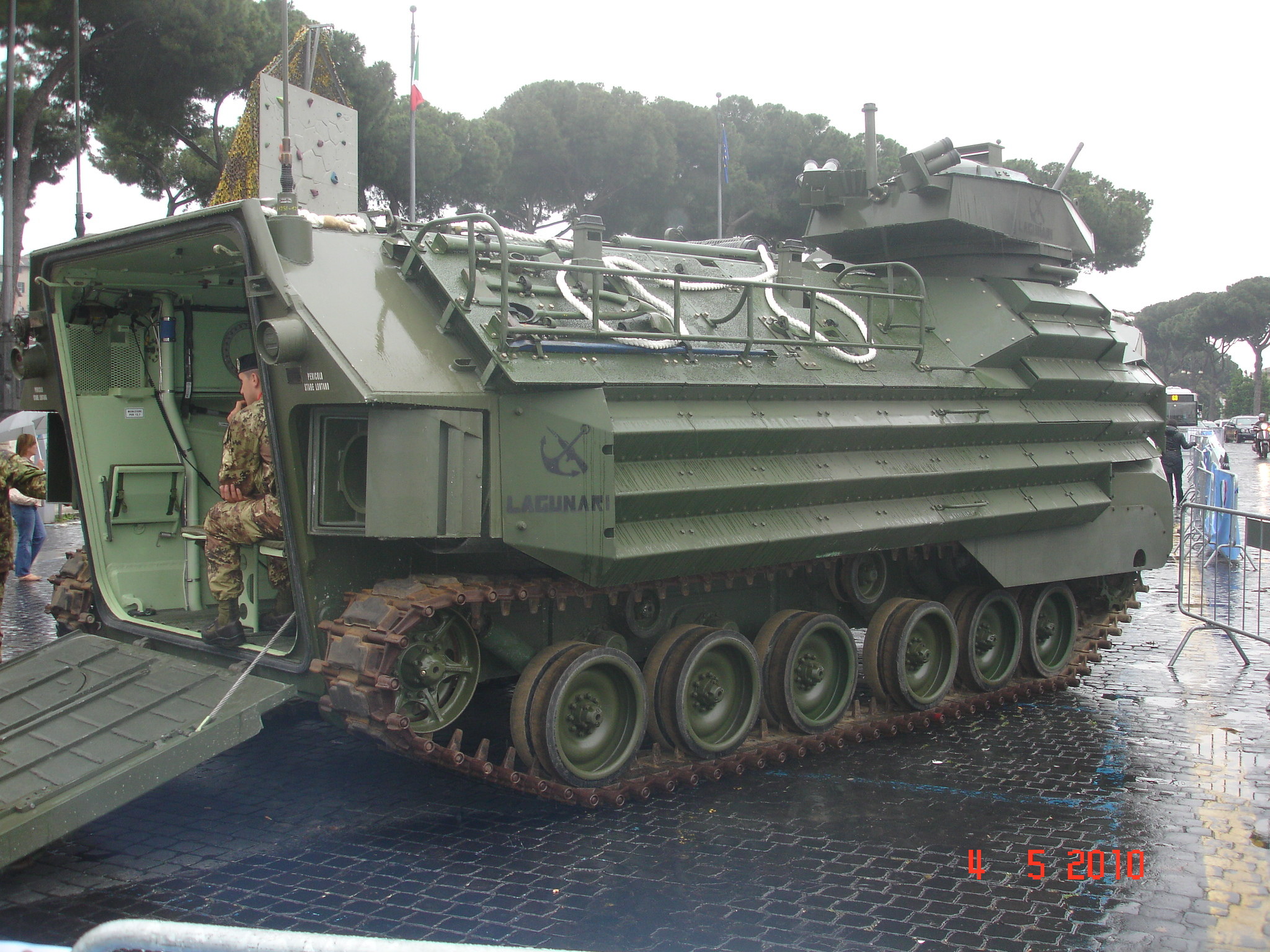 Mezzo da combattimento Anfibio del Reggimento Lagunari (EI) fotografato a Roma in piazza Venezia nel Maggio 2010